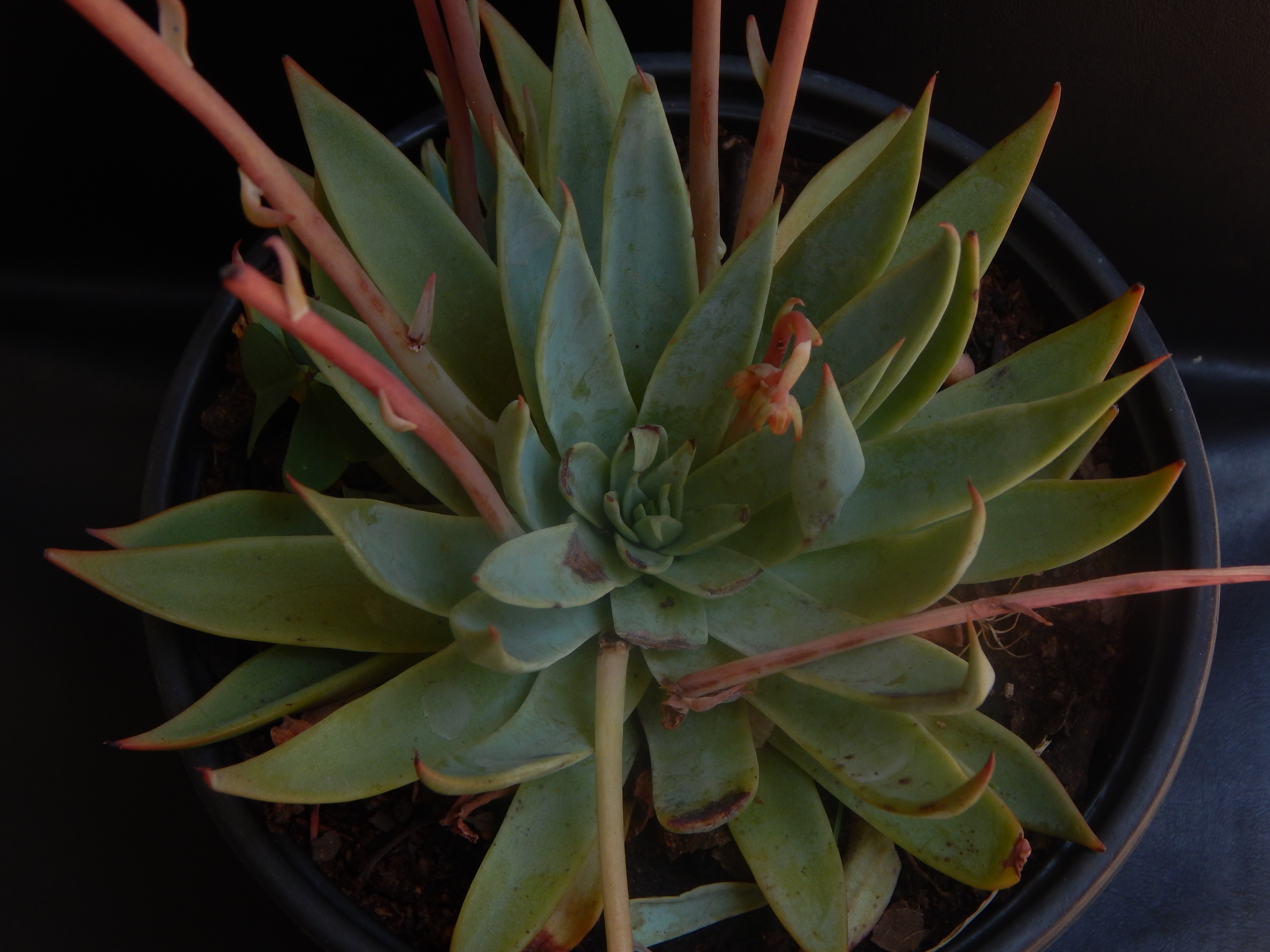 Roseta